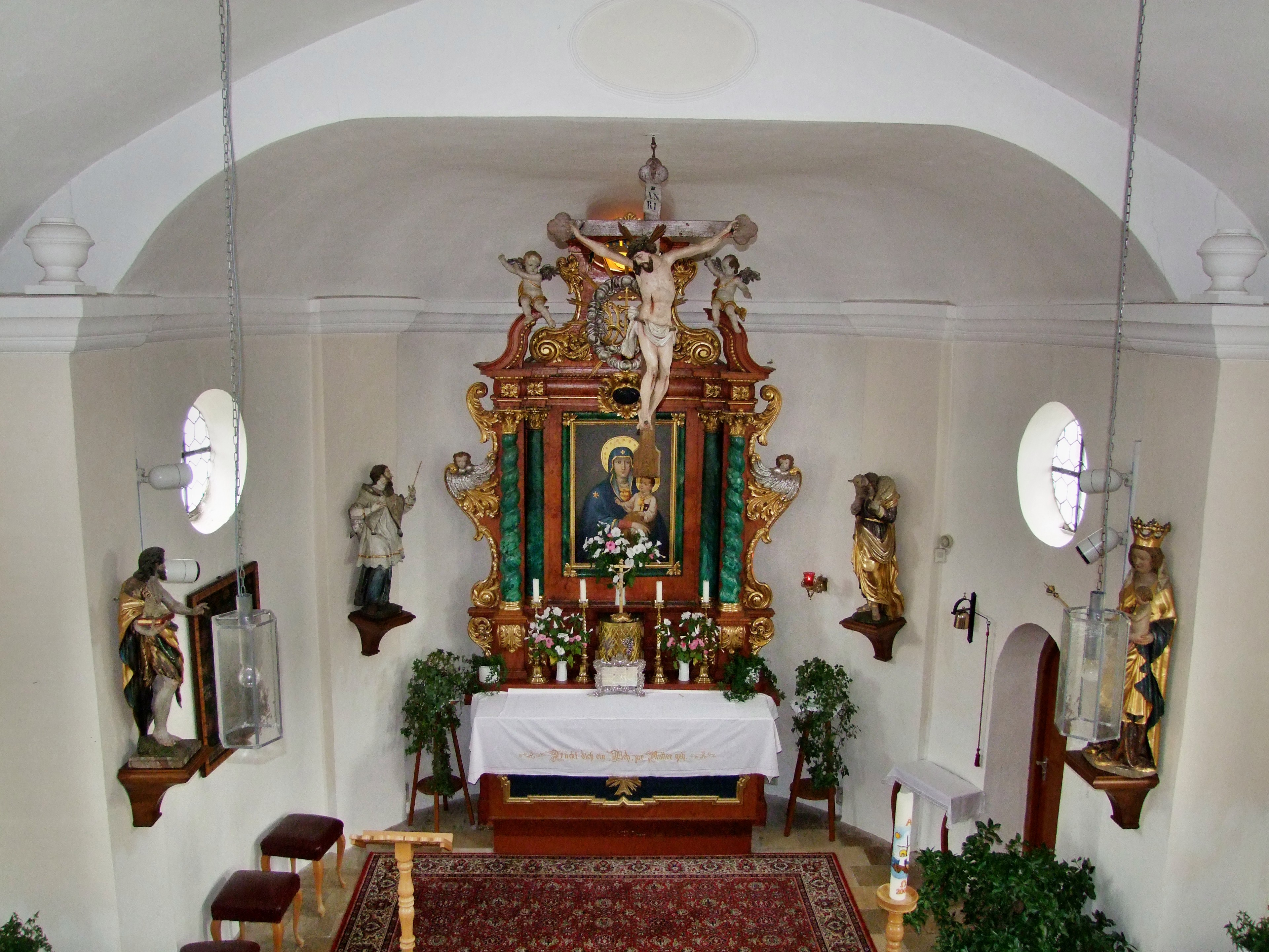 Altarraum von St. Johann Nepomuk (Memmingen)